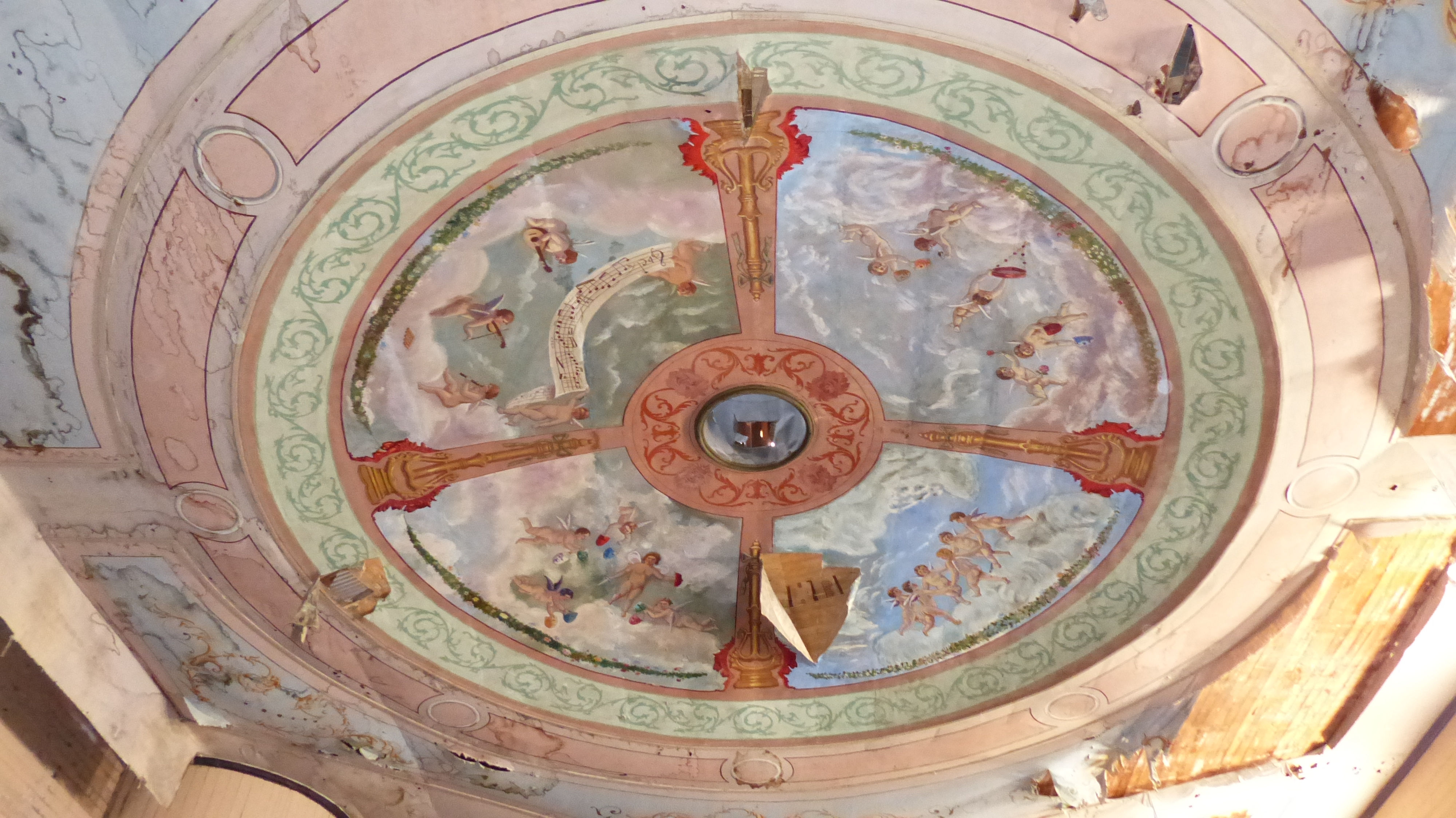 Teatro Municipal de Pisagua This is a photo of a national monument in Chile: 282